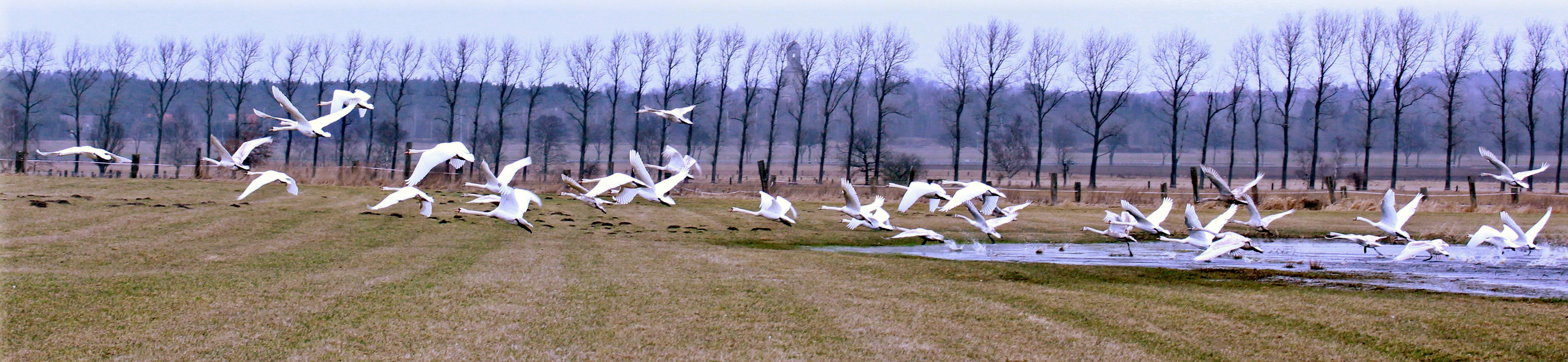 Startende Schwäne in der Elsteraue bei Kahla.